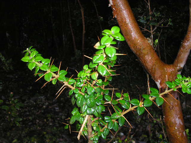 Rama de chauchao o arrayán macho (Rhaphithamnus spinosus) en Colecole, costa occidental de Chiloé